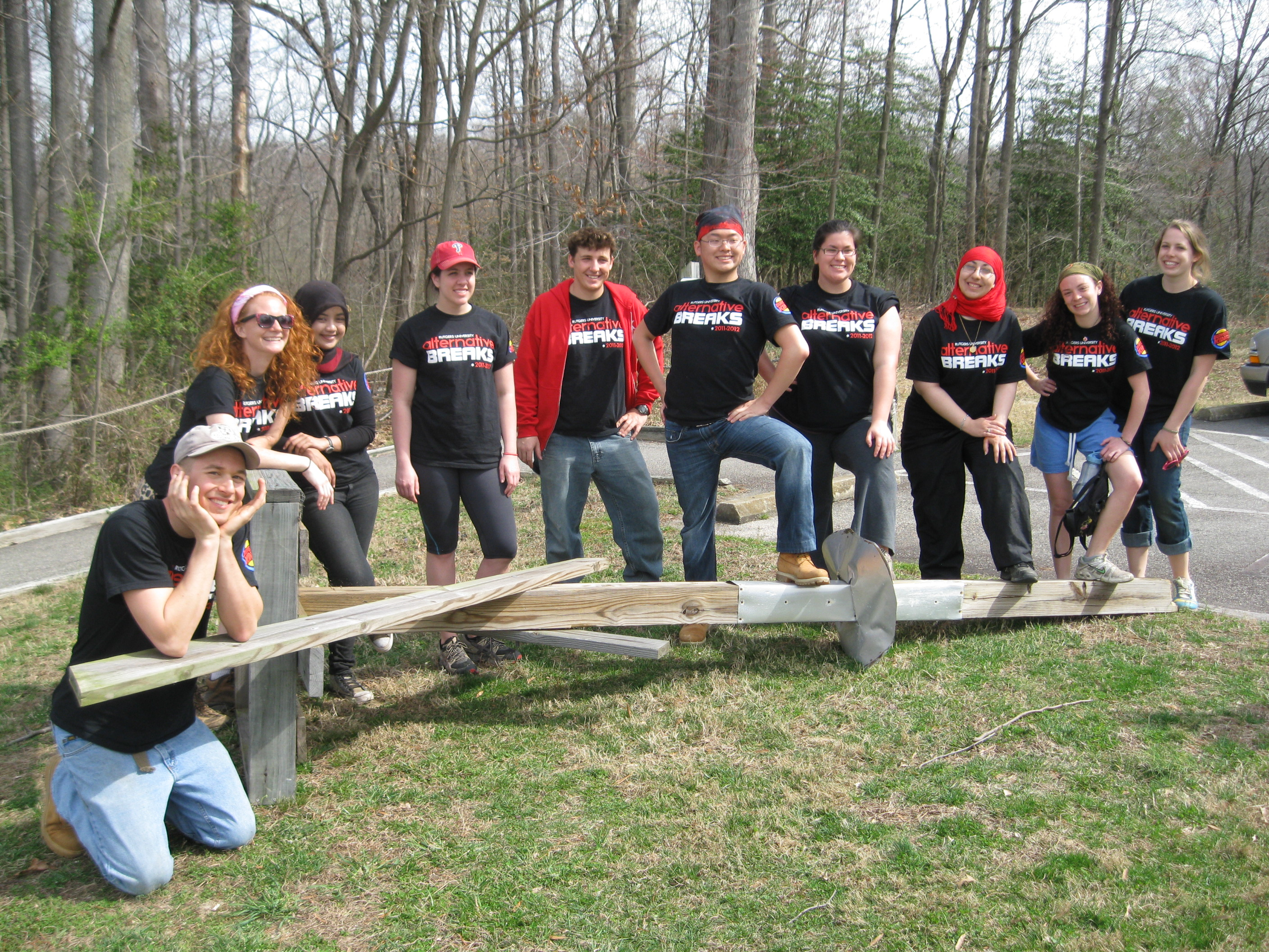 jbp